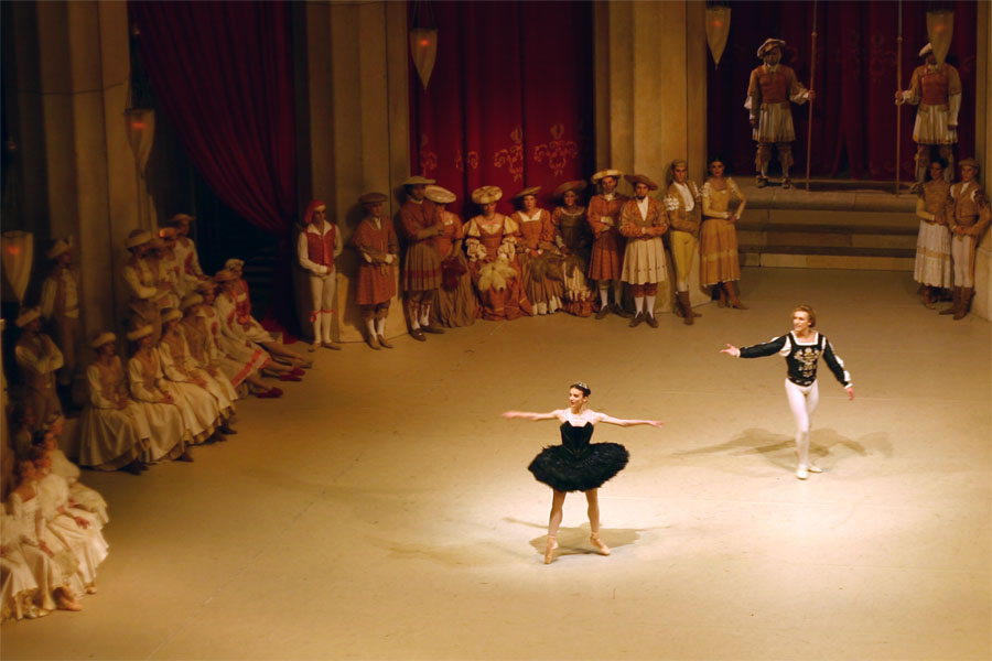 Szene aus Ballett Schwanensee (3. Akt) am 8.10.2004 in der Wiener Staatsoper Besetzung: Odile: Simona Noja, Prinz Siegfried: Jürgen Wagner Choreographie: Rudolf Nurejew nach Marius Petipa Bühnenbild und Kostüme: Jordi Roig Choreographische Einstudierung: Richard Nowotny